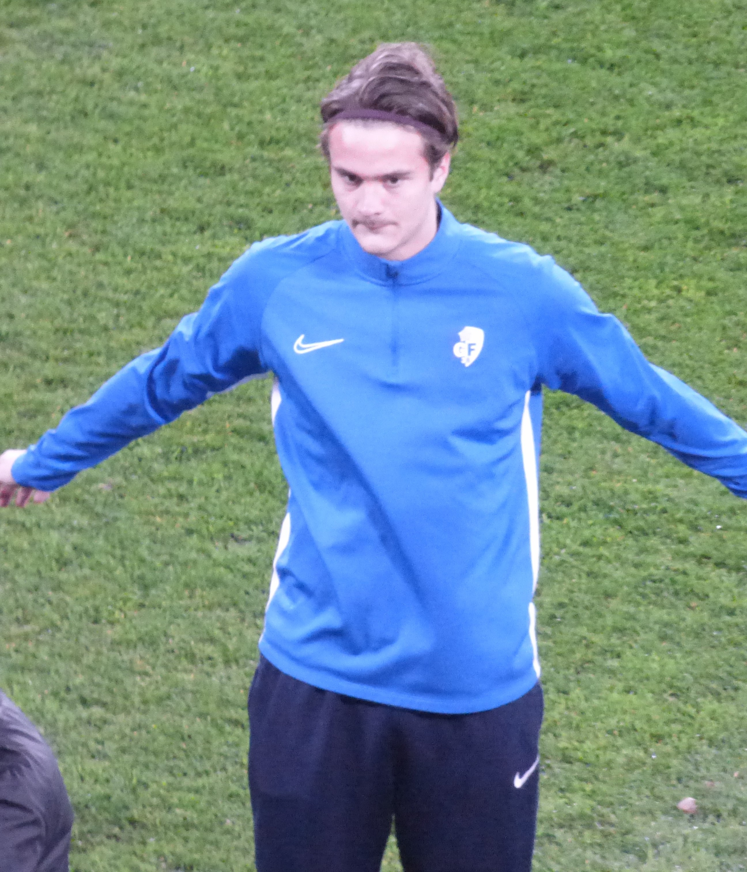 Kristófer Kristinsson lors du match RC Lens / Grenoble Foot 38, le 10 février 2020, comptant pour la vingt-quatrième journée du championnat de France de football de Ligue 2 2019-2020, au Stade Bollaert-Delelis.